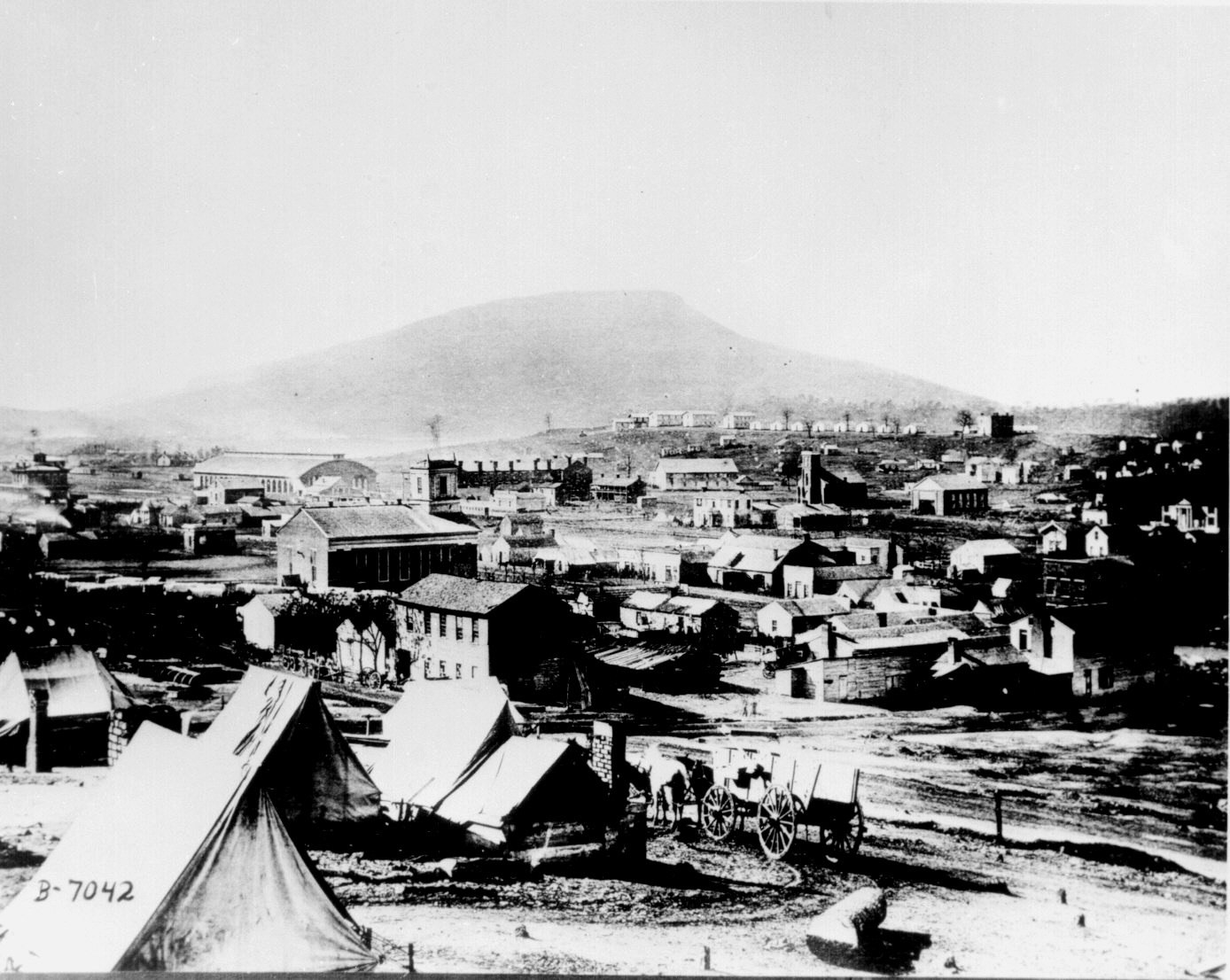 Chattanooga pendant la guerre de Sécession, 1864. Tentes de soldats et chariots d'intendance, à proximité du bâtiment communal. Image empruntée à l'article original sur le wikipédia américain.